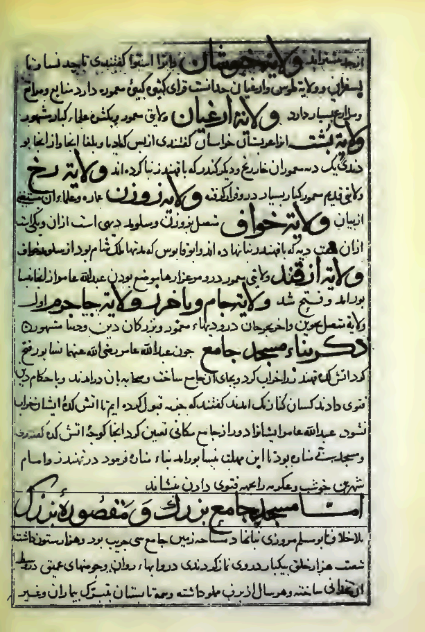 تصویر صفحه‌ای از تاریخ نیشابور الحاکم که در آن به ولایت‌های نیشابور، پرداخته است